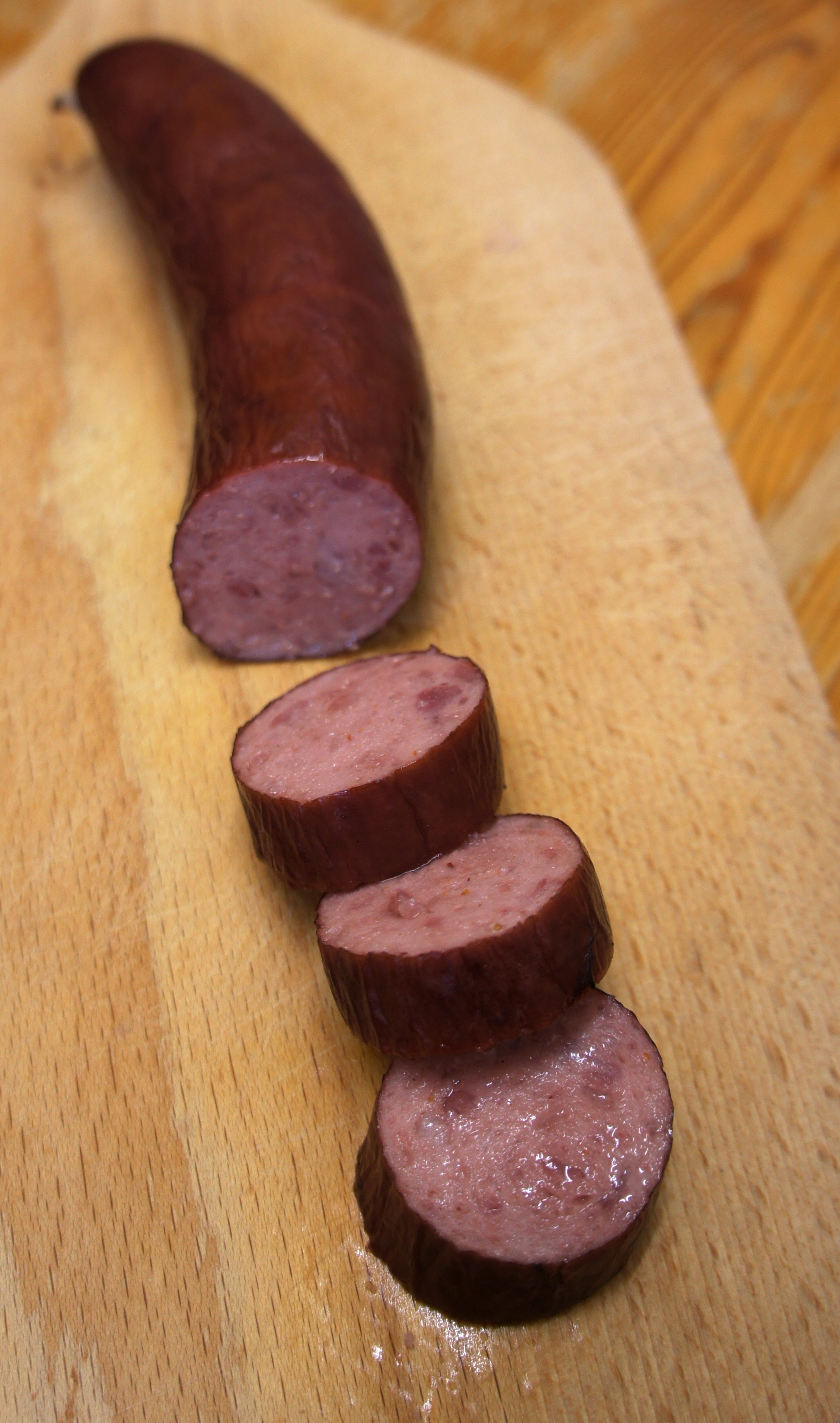 Ein heisser (gekochter) St. Galler Schüblig angeschnitten.